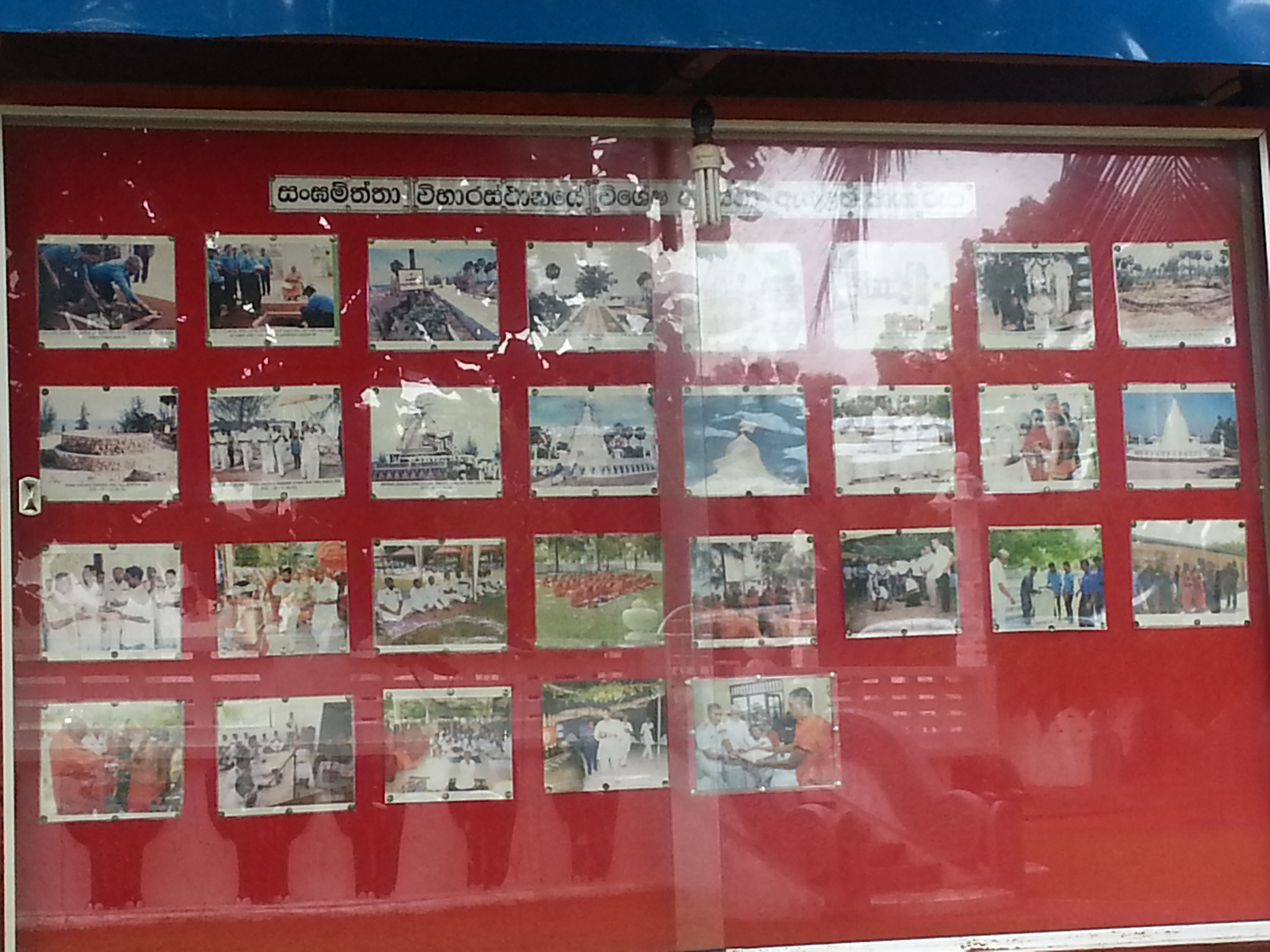 ஆதார சான்றுகள்